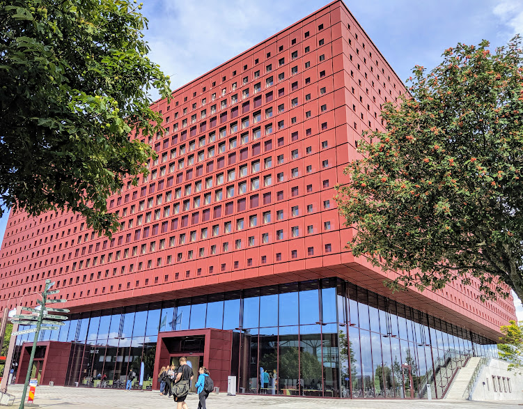 Bild på Studenthuset, Campus Valla, strax innan invigningen 2019.